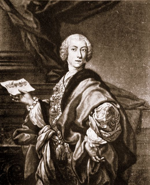 El contratenor italiano Angelo Maria Monticelli (1715 - 1758)